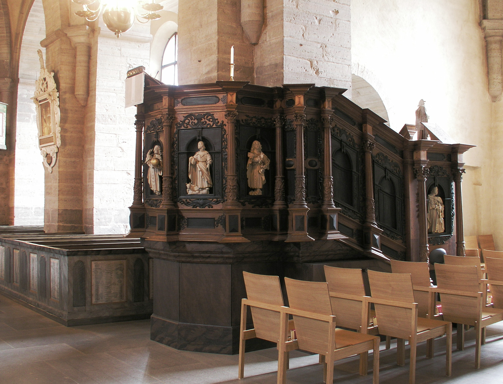 Vreta Klosterkyrka; Pulpit in Vreta Monastery Church